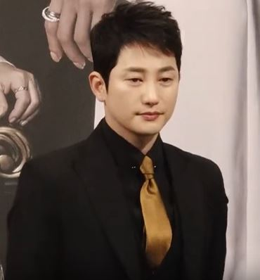 24일 서울 강남구 임피리얼팰리스 호텔에서 진행된 TV CHOSUN(TV조선)의 새 토일드라마 '바벨'의 제작발표회